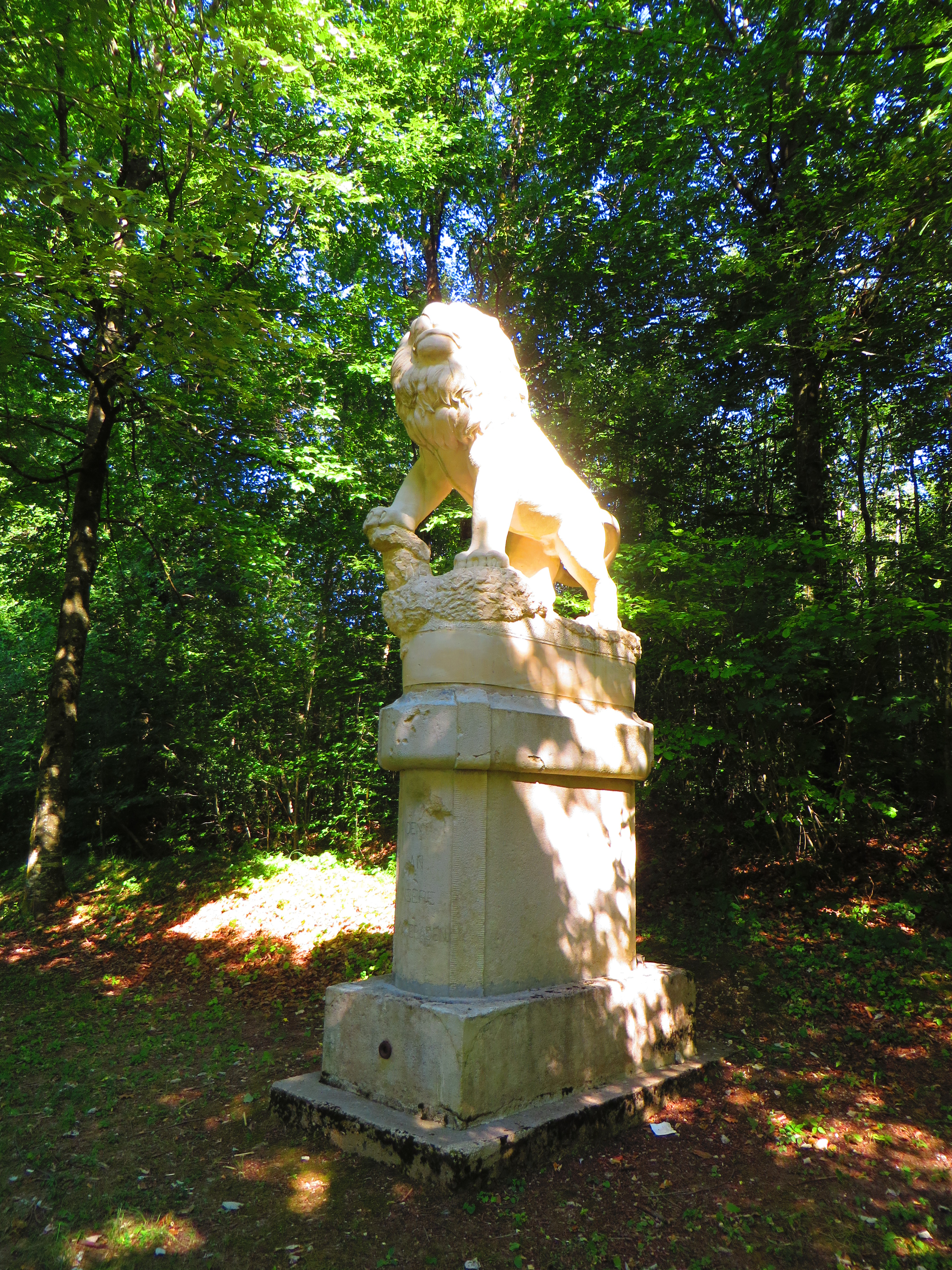 Valbois monument du lion